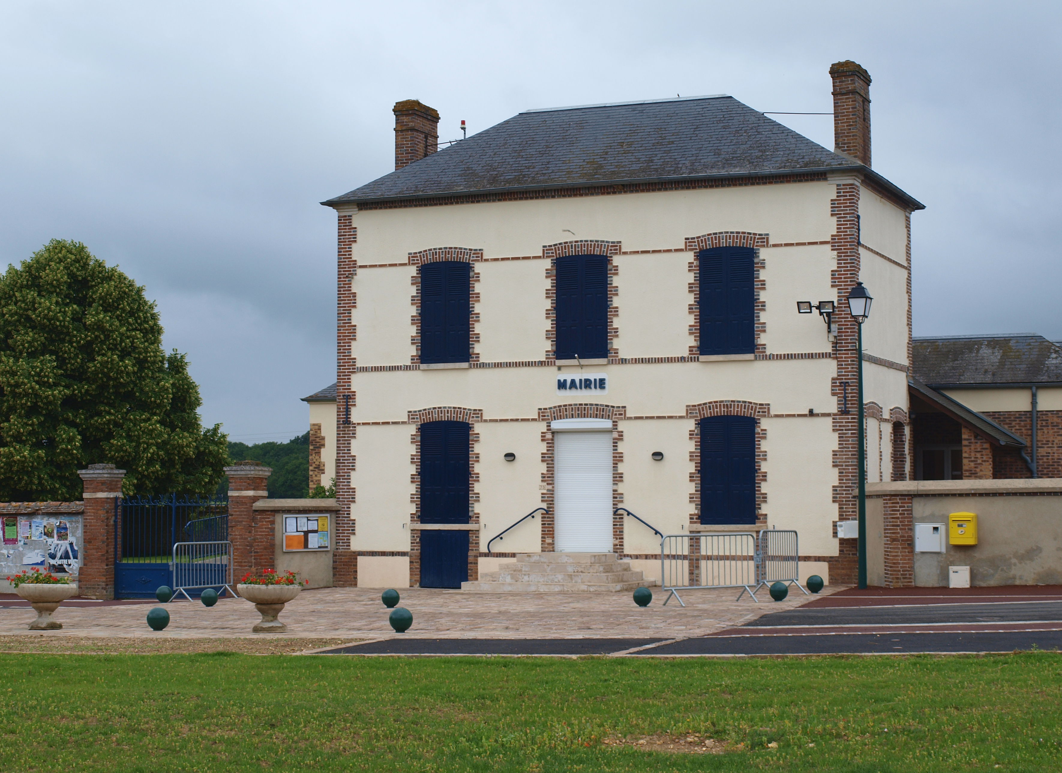 Louzouer (Loiret, France) , la mairie